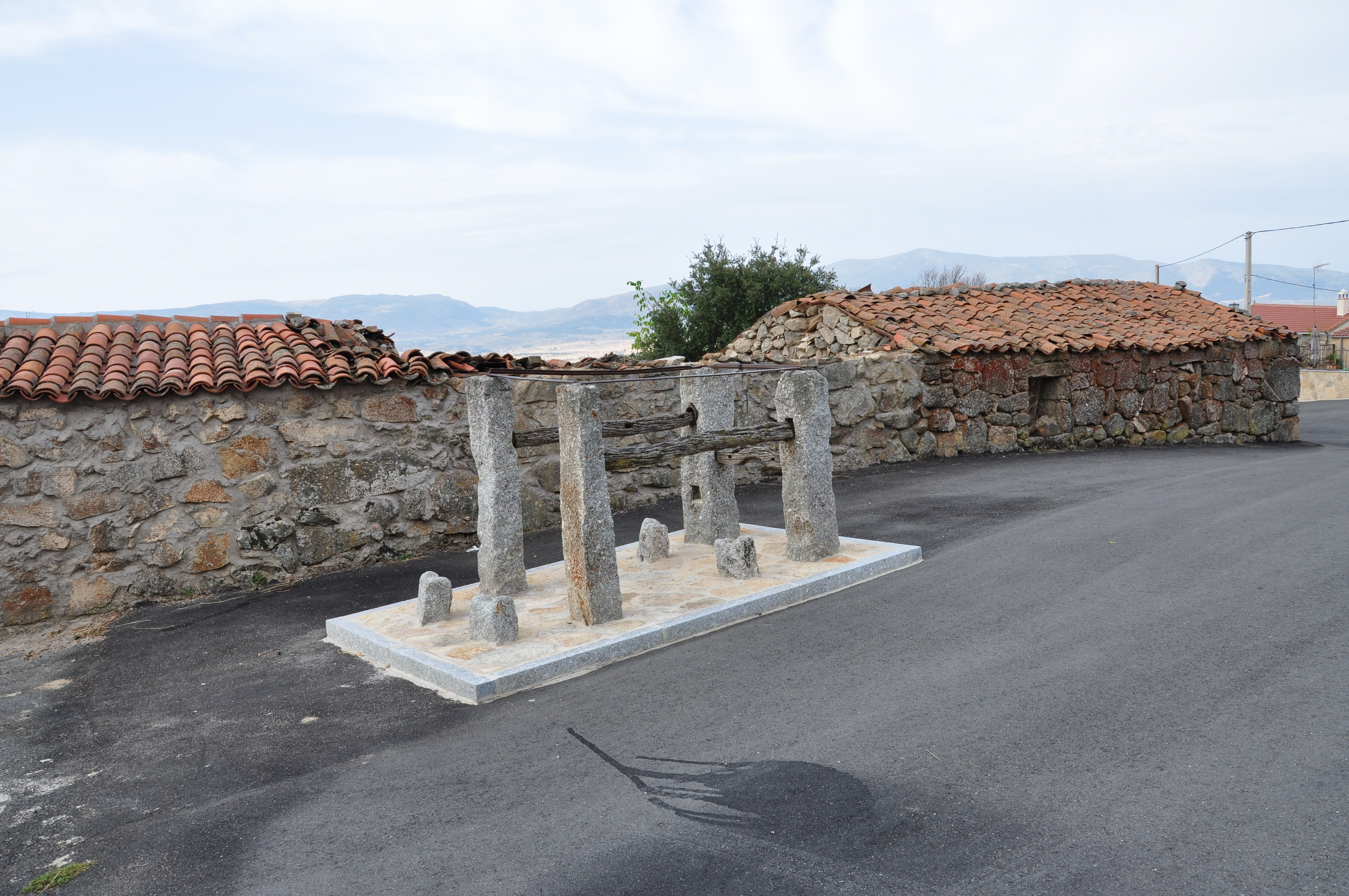 Potro de Oco, La Torre-Ávila, España.